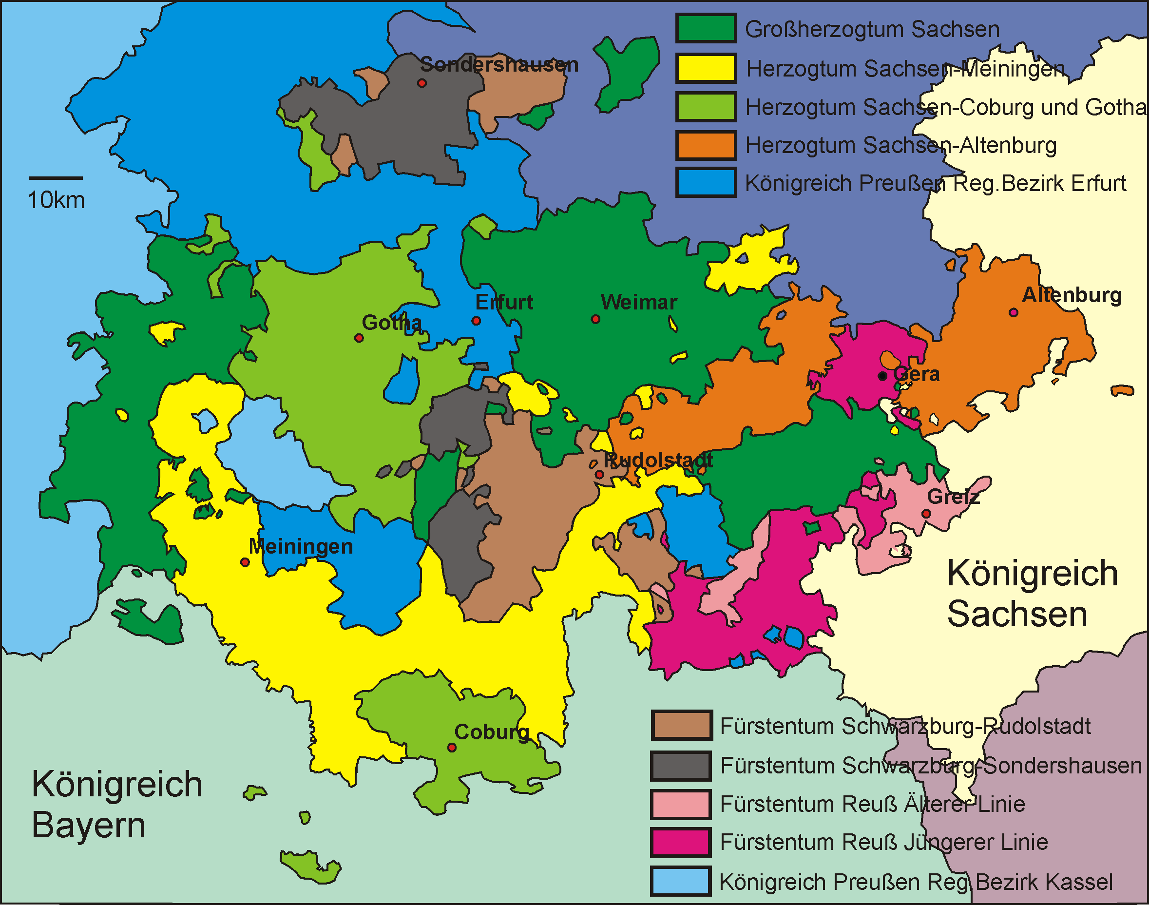 Karte Thüringen 1910.